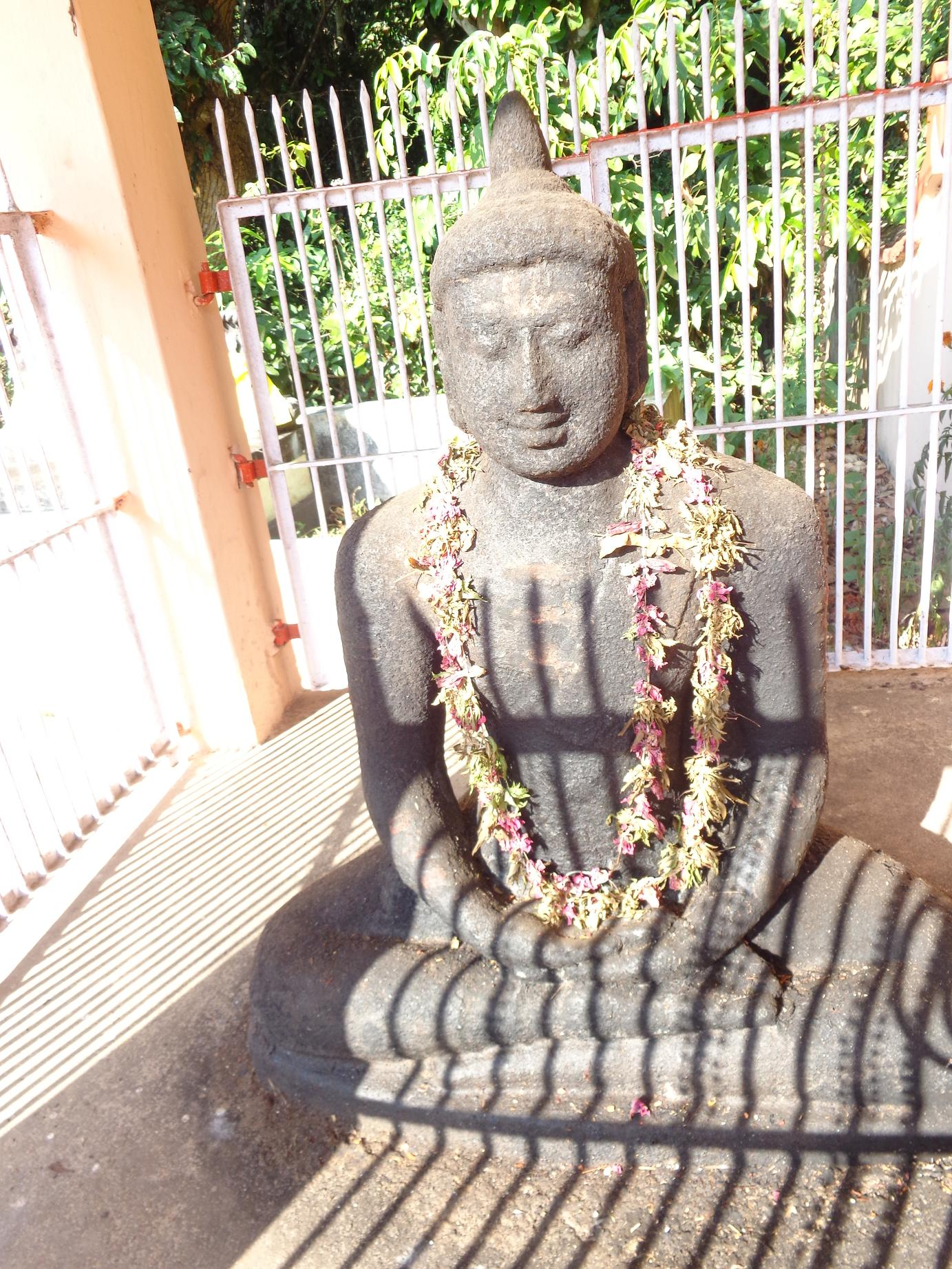 the budha statue at kattanam bharanikavu bhadrakali temple, kattanam alappuzha dist